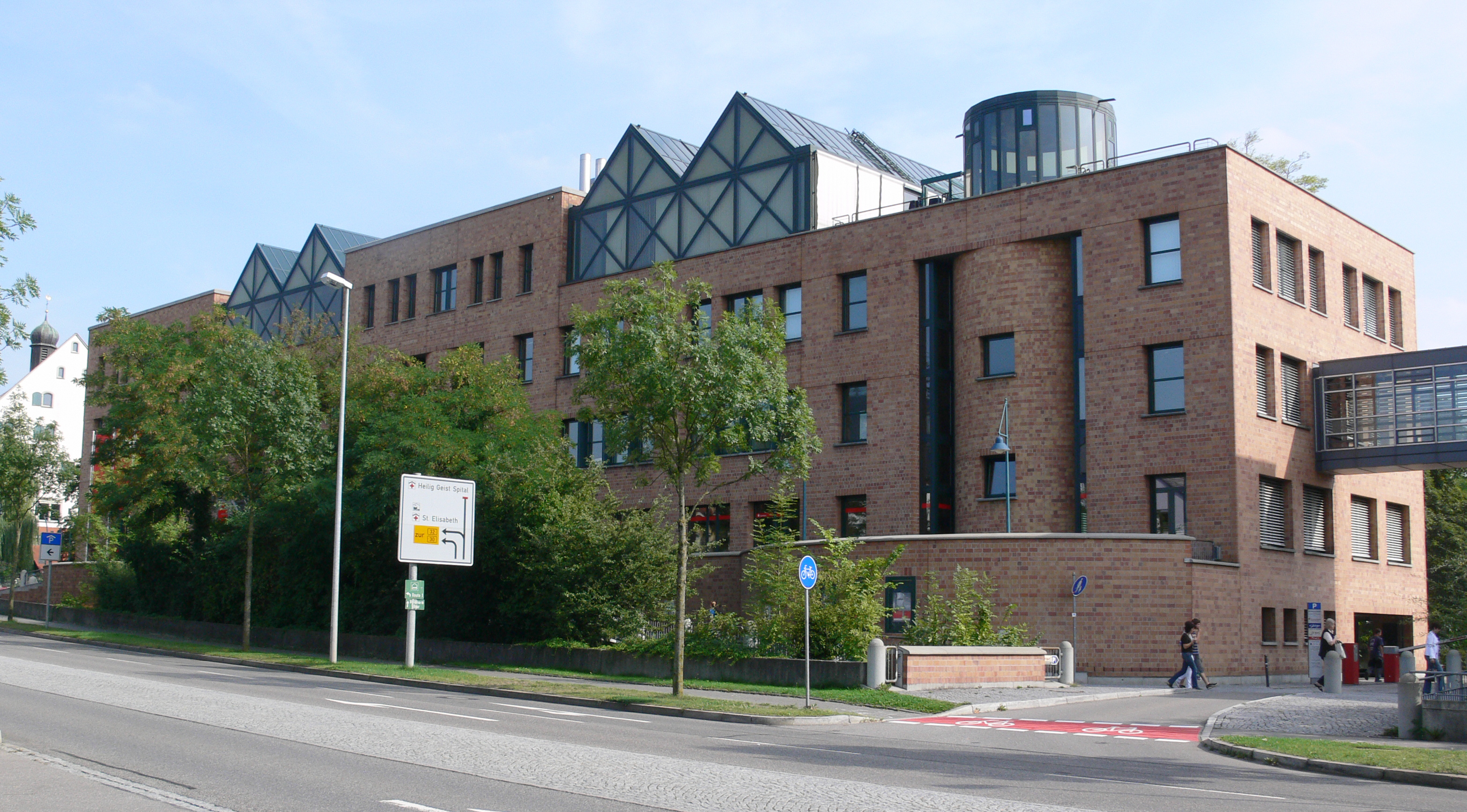 Kreissparkasse Ravensburg, Hauptstelle („Geschäftsstelle Pfannenstiel“), Meersburger Straße 1, Ravensburg